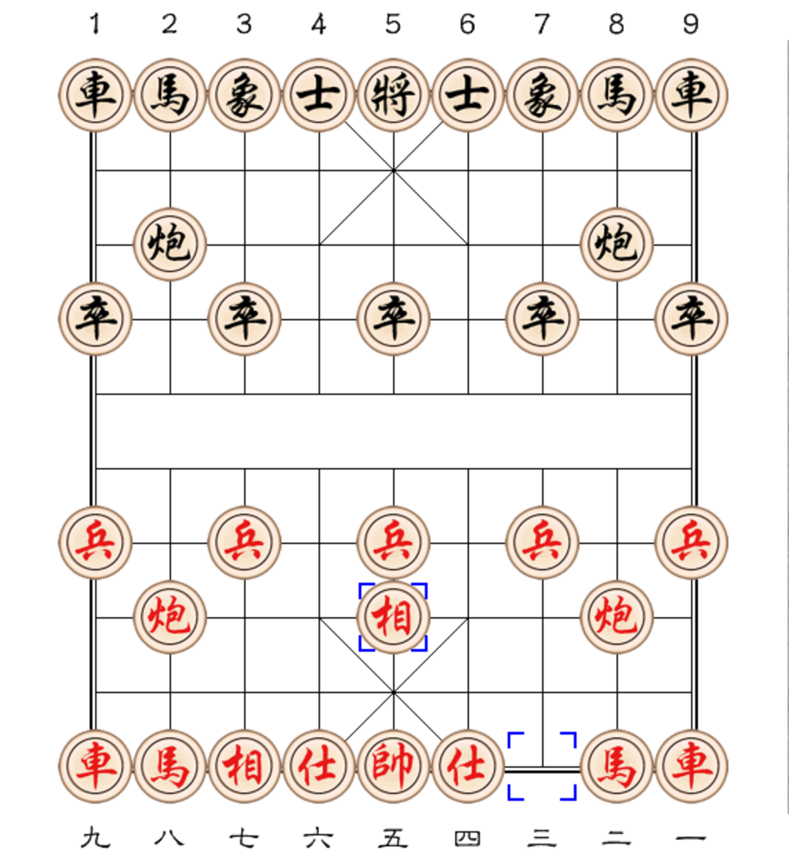 Phi tượng